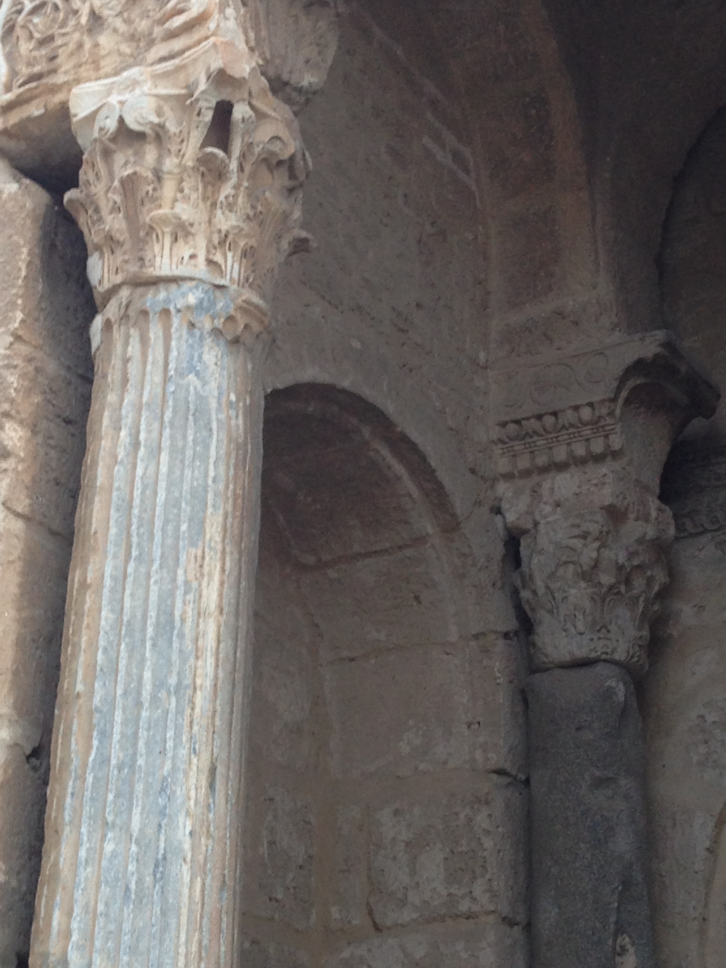 Colonnes romaines réemployées au ribat de Sousse (Tunisie)